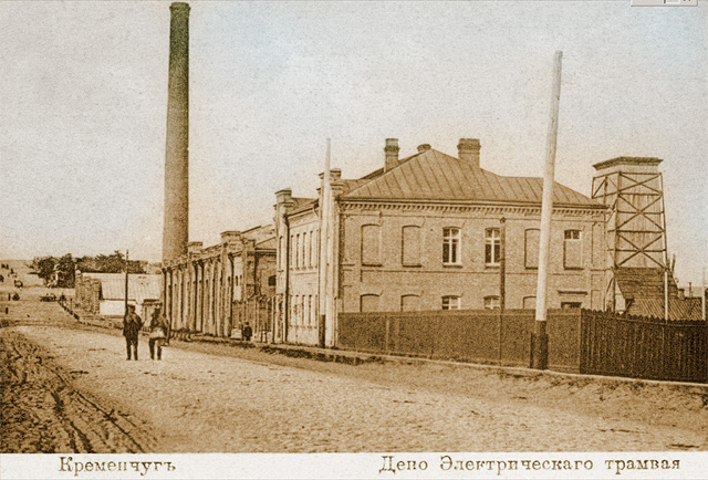 Postcards of old Kremenchuk. Трамвайне депо.